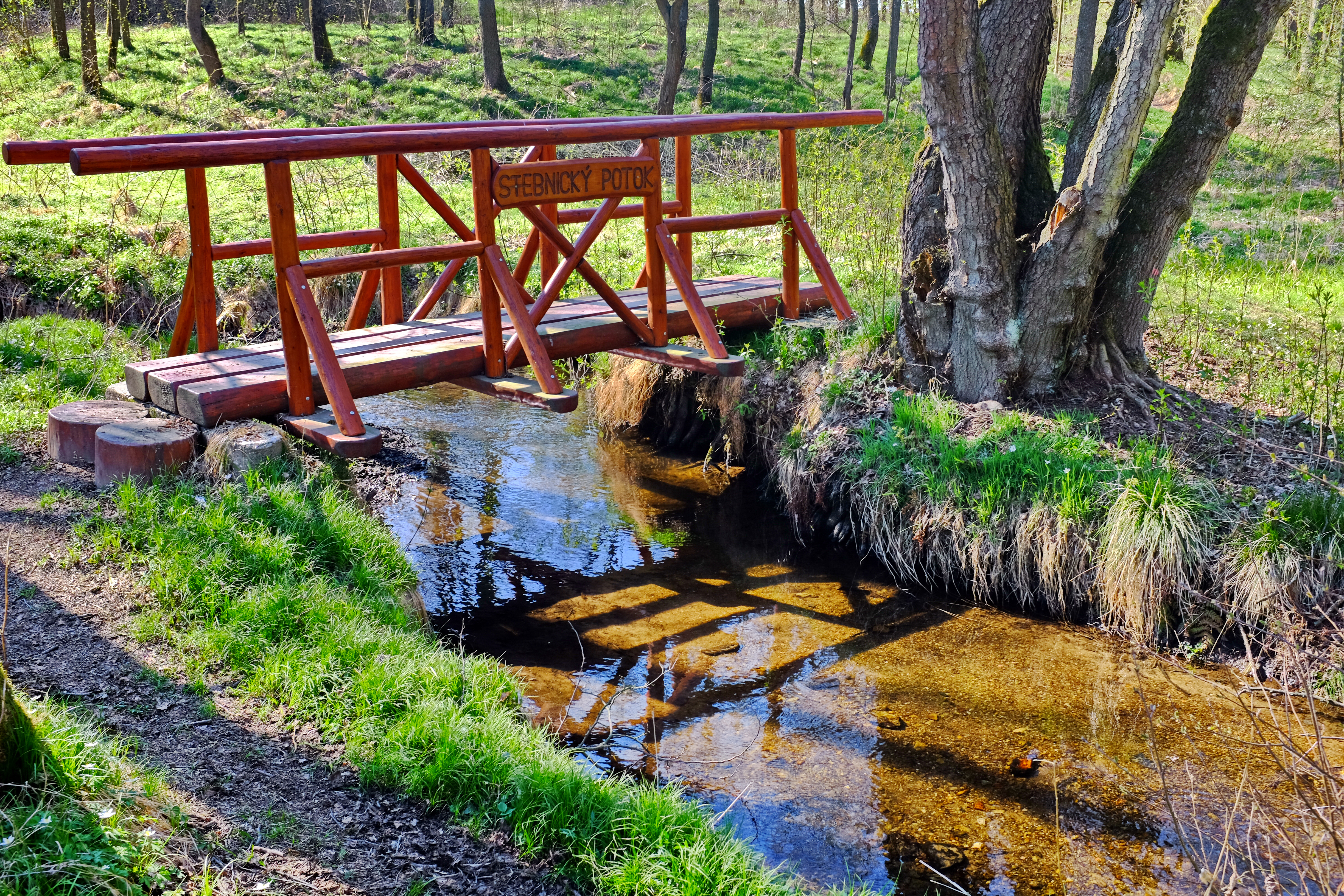 Stebnický potok, přítok Odravy, můstek u Doubravského mlýna, okres Cheb